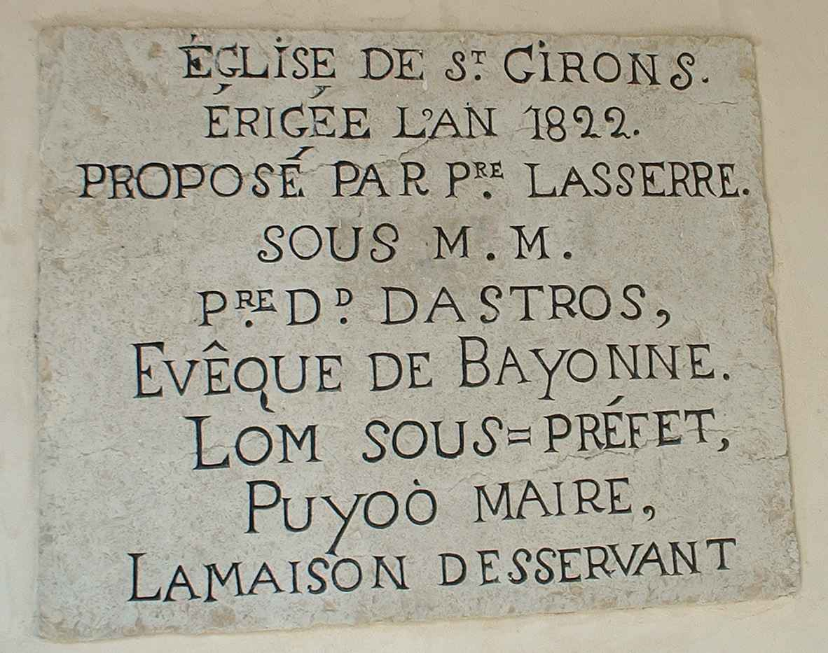 Plaque historique église Saint-Girons en Béarn.